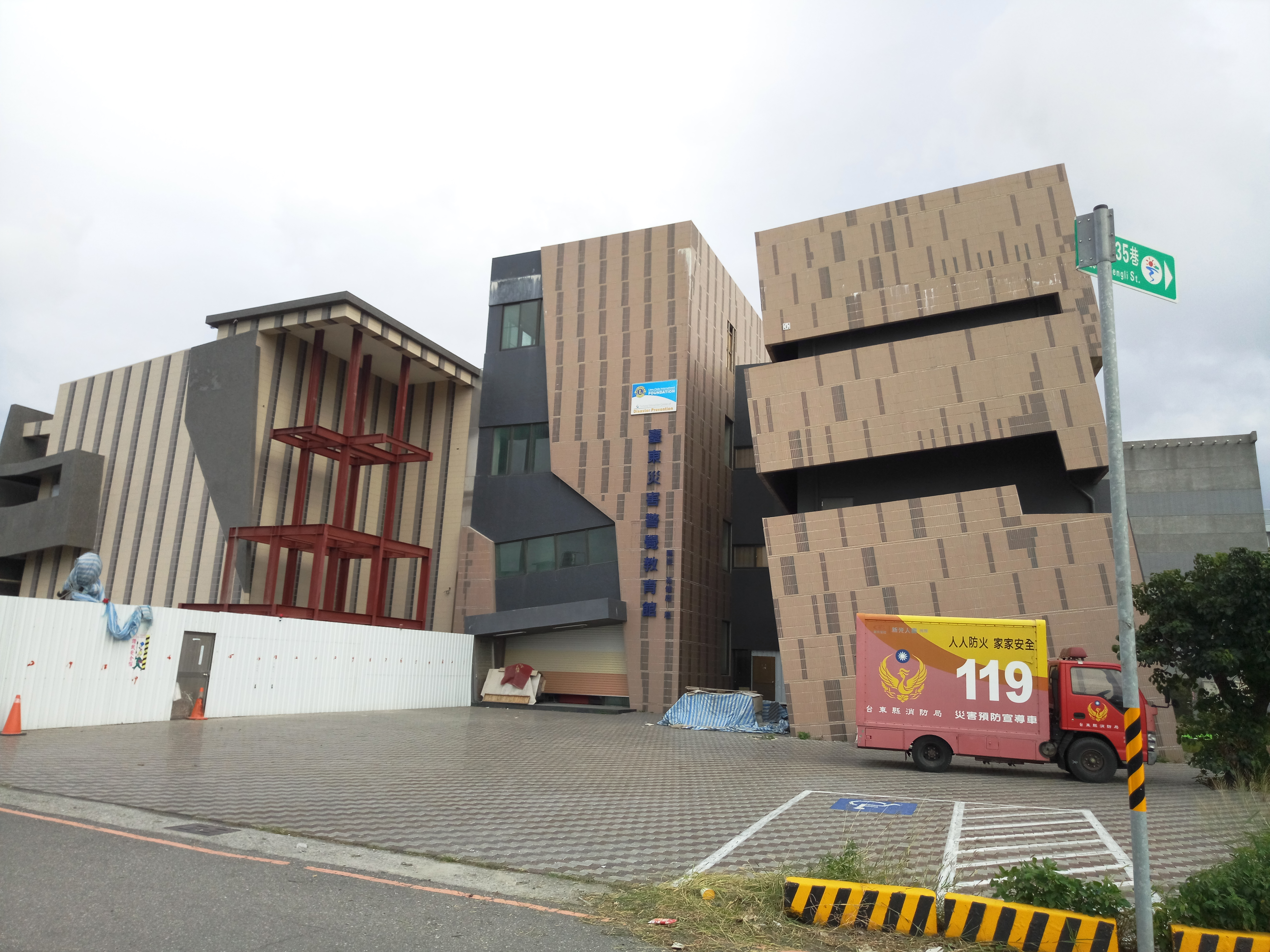 臺東災害警覺教育館，隸屬臺東縣消防局，位於臺東縣臺東市四維路二段150號。